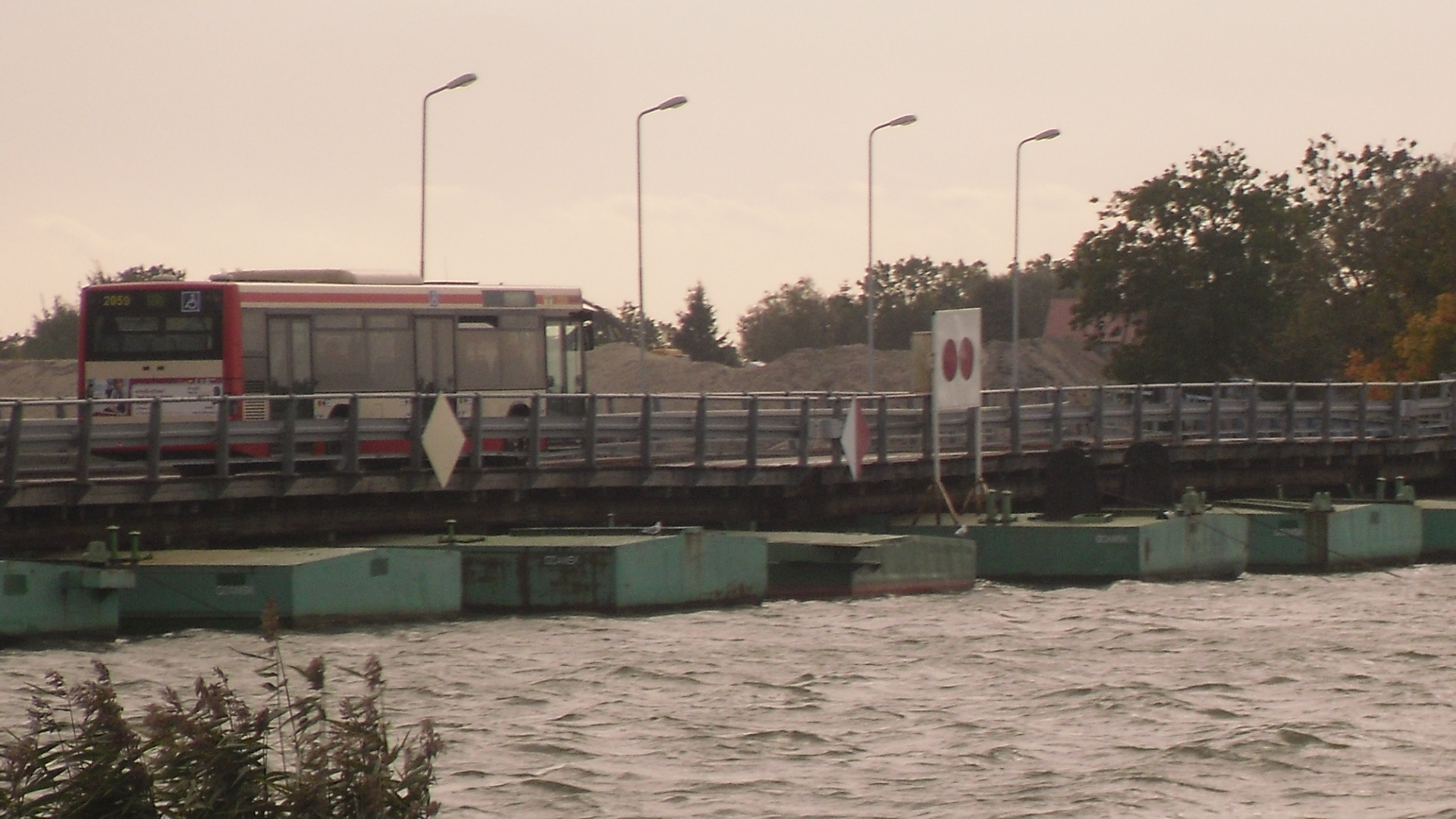 Autobus MAN (#2059) należący do gdańskiego ZKM na moście sobieszewskim.